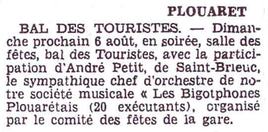 Annonce d'un bal à Plouaret le 6 août 1939.